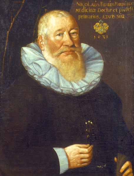 Prof. Nikolaus Braun auf einem Gemälde aus der Gießener Professorengalerie; Ansichtskarte des Gießener W. Schmitz Verlages. Text auf der Rückseite der Ansichtskarte: Nicolaus Braun, 1558 - 1639. Professor der Physik (1599 - 1637) und der Medizin (1608 - 1637) in Marburg. Er schuf die Fortsetzung des berühmten "Neuw Kreuterbuch" von J.Th. Tabernaemontanus. (Aus der Professoren-Galerie der Universität Gießen)